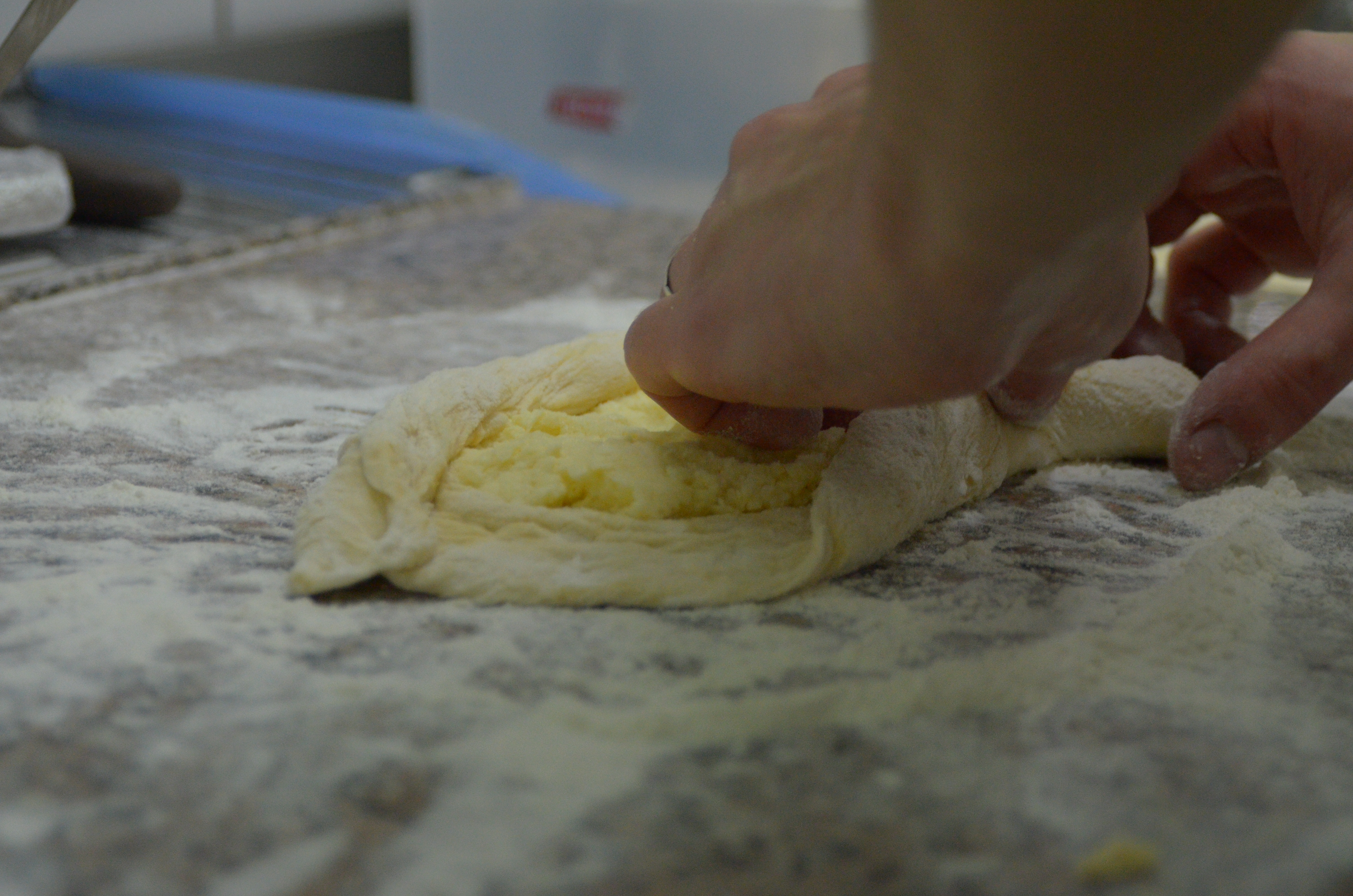 Ресторан «Ньютон» в Донецке.